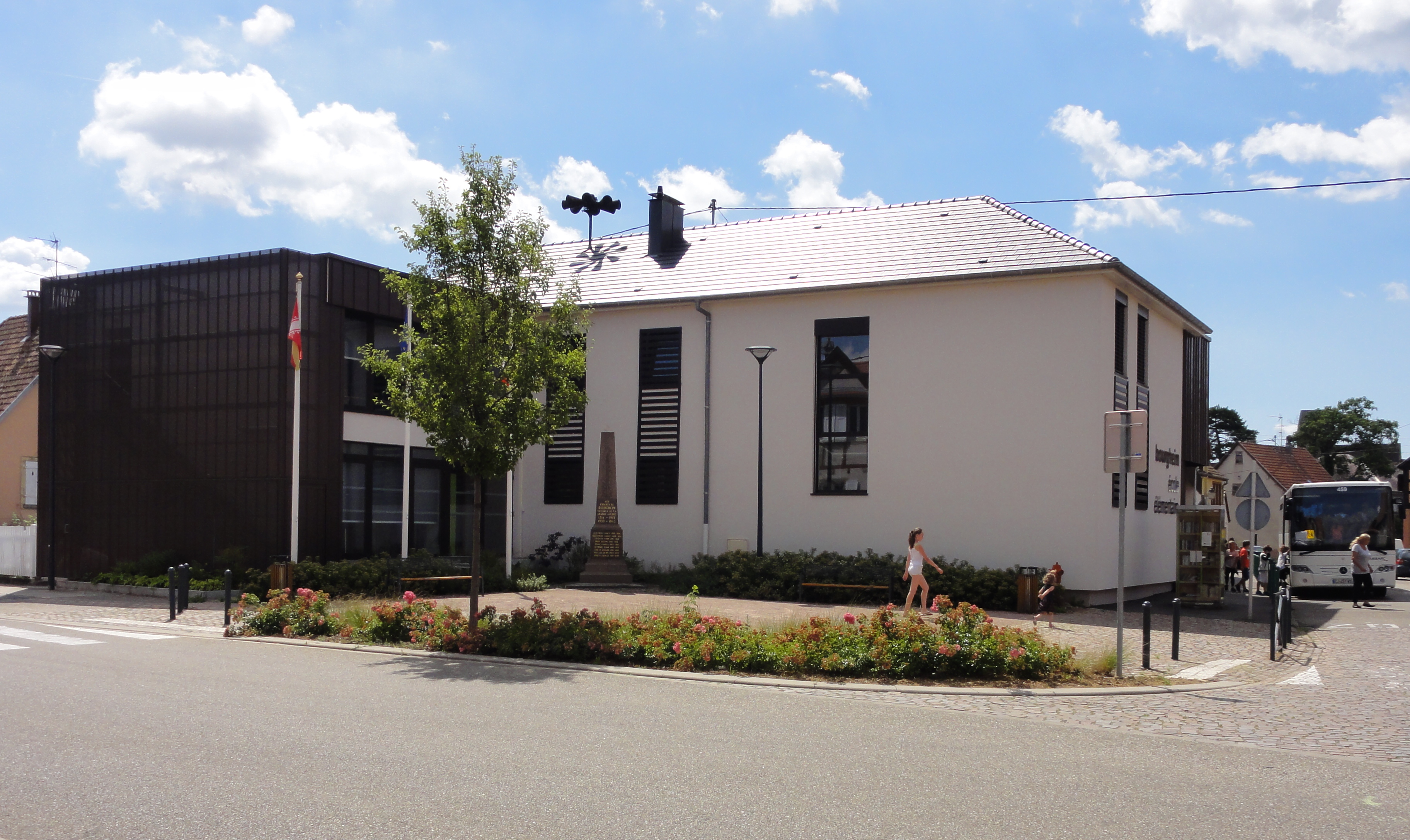 Alsace, Bas-Rhin, Bourgheim, Nouvelle école.